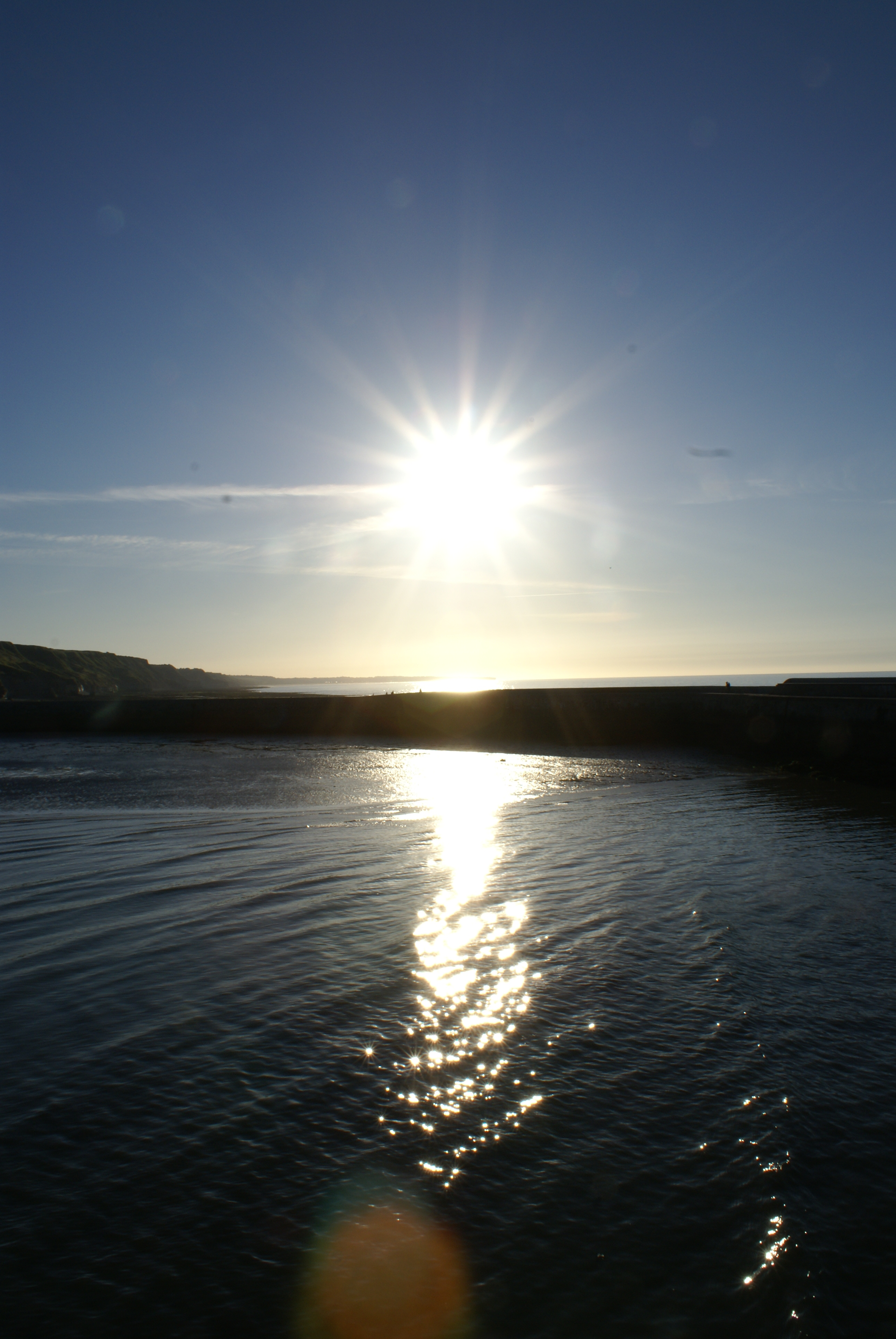 Zonsondergang, voorbeeld van diffractie